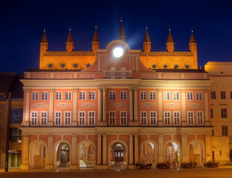 Rostocker Rathaus bei Nacht